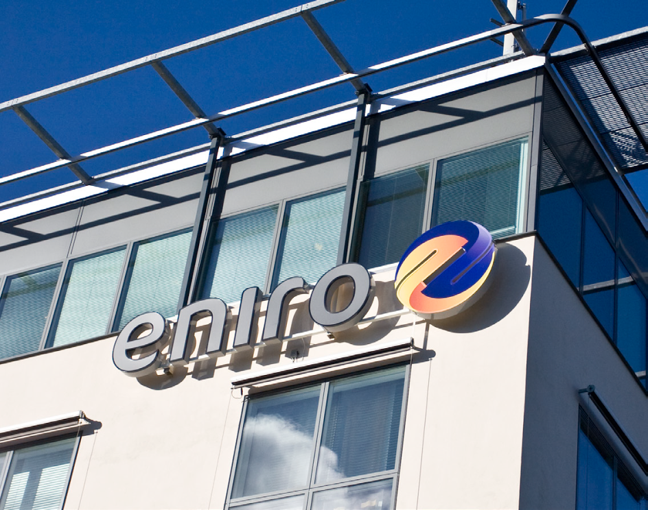 Eniros huvudkontor i Solna längs med E4 (besöksadress: Gustav III:s Boulevard 40)